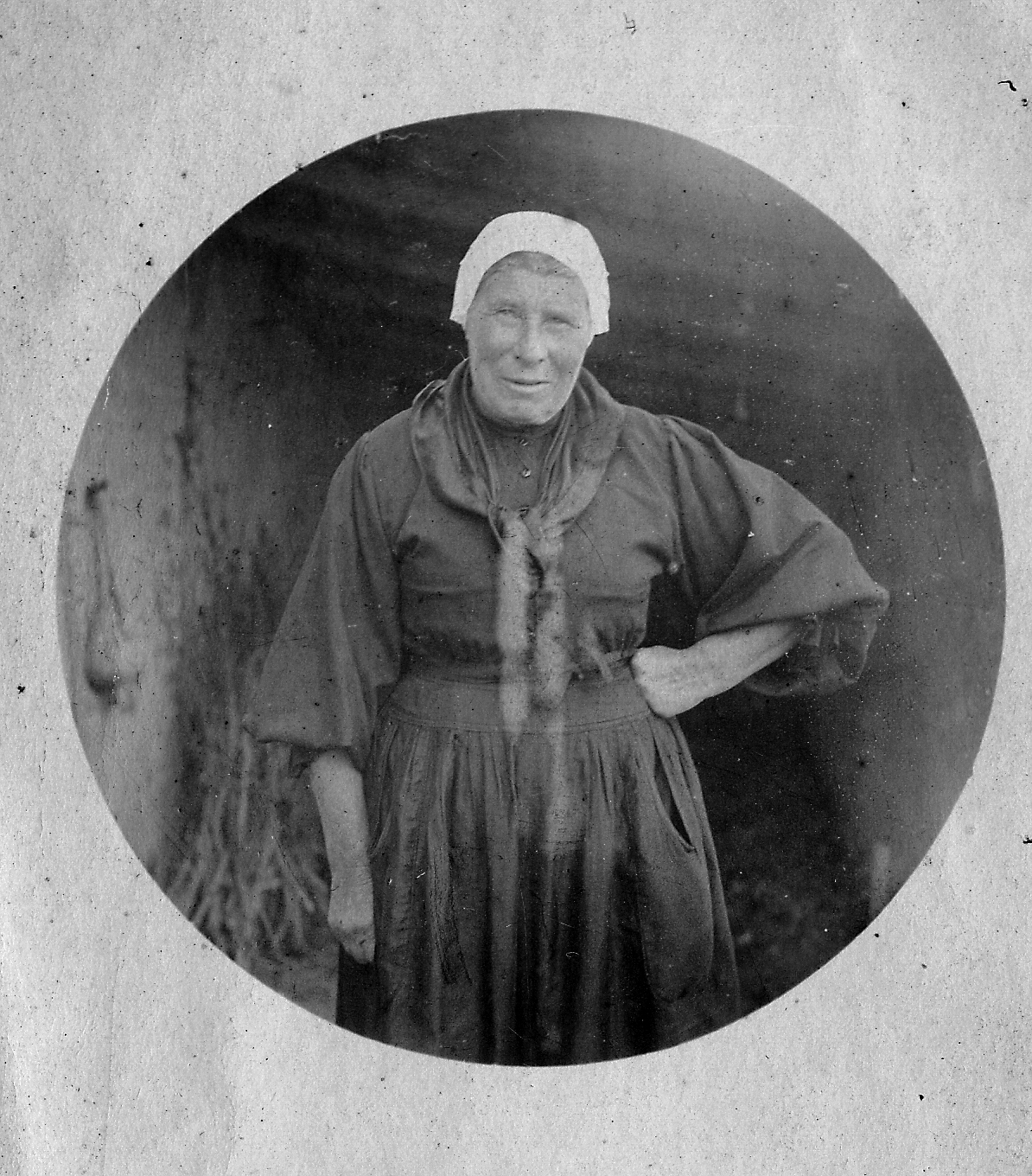 La mère Prudence (Prudence CLOUTOUR), de La Girvière, Olonne sur Mer (Vendée). Album familial personnel